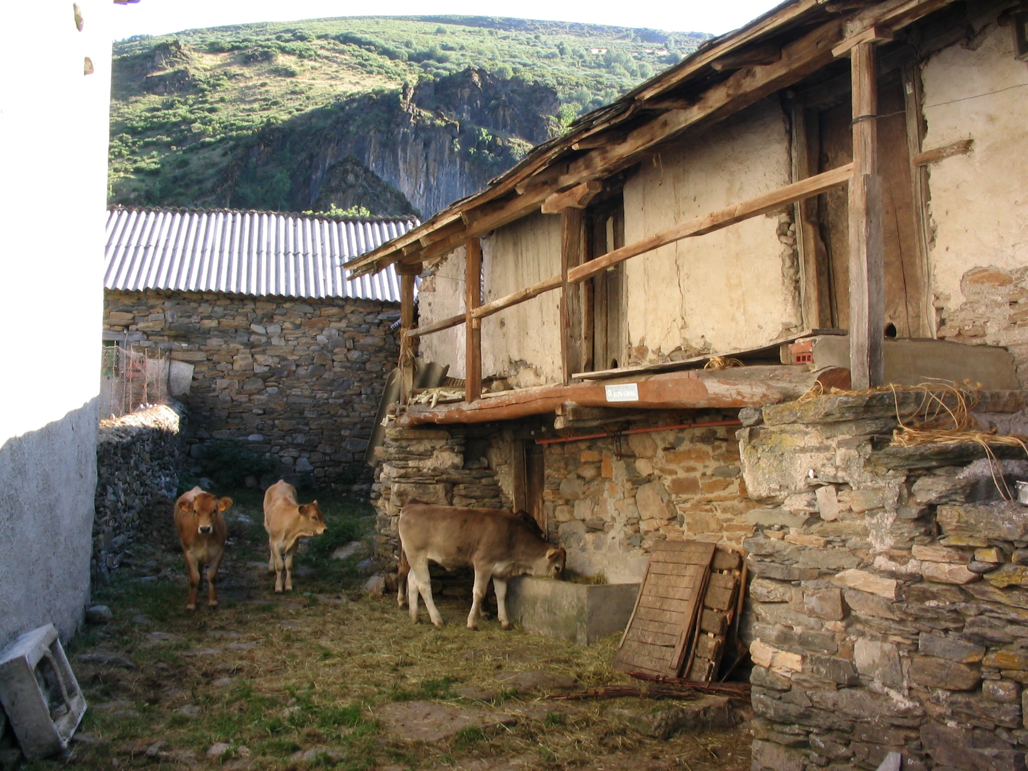 Vegapujín, León, España. Casa típica con ganado vacuno.